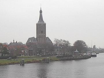 Hasselt (Nederland), eigen foto